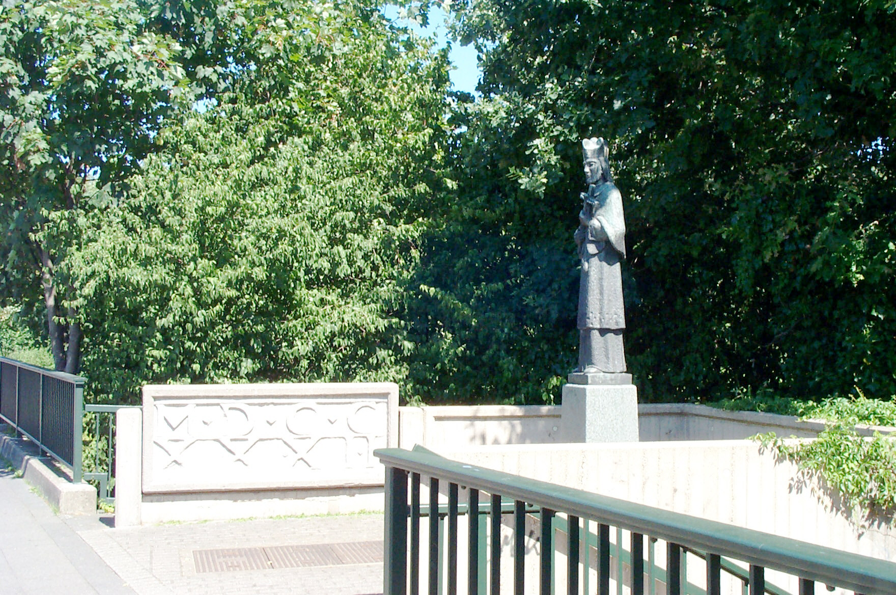 Statue des heiligen Nepomuk an der Wupperbrücke in Leverkusen-Opladen